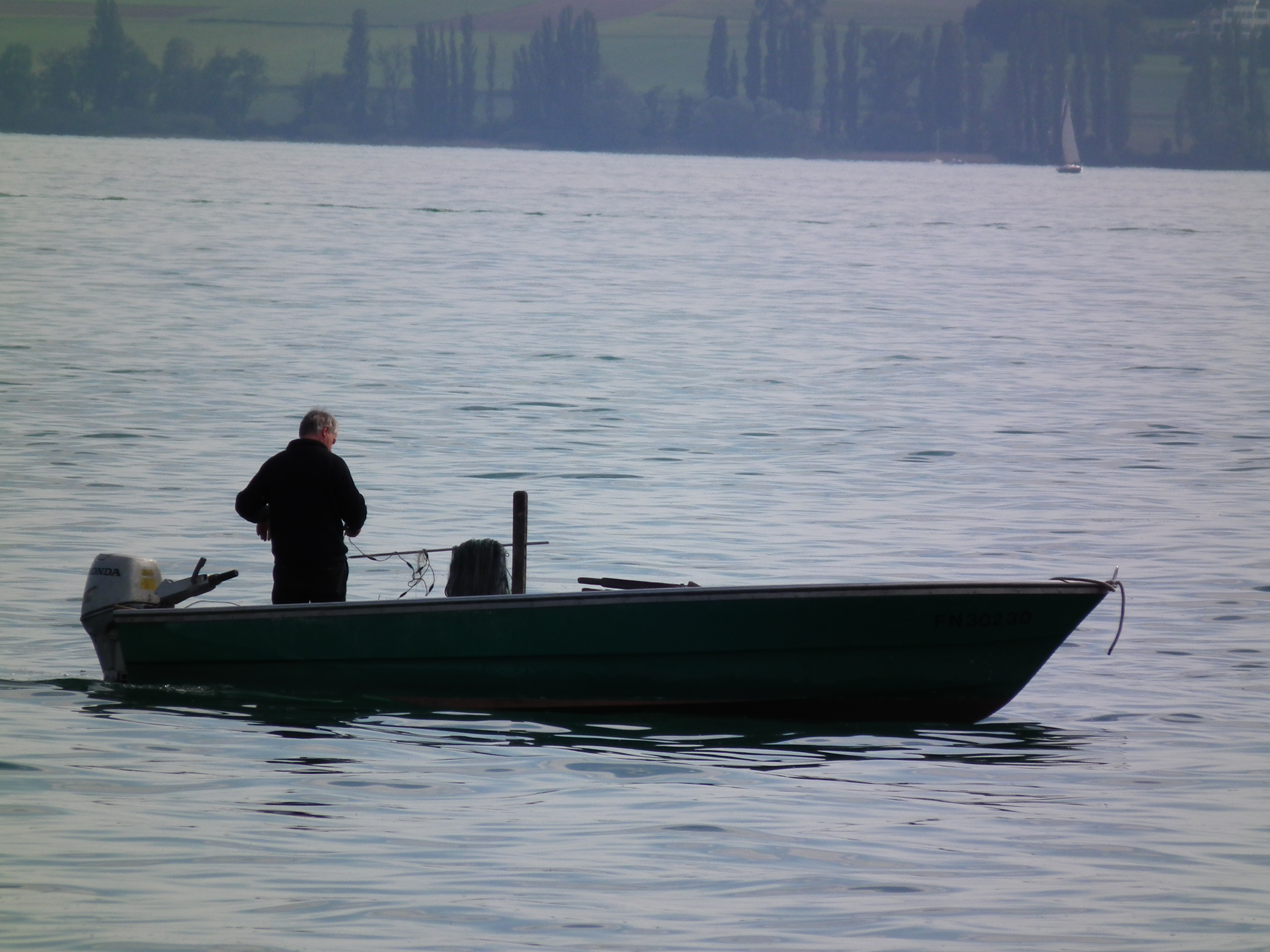 Fischer auf dem Bodensee (Deutschland)